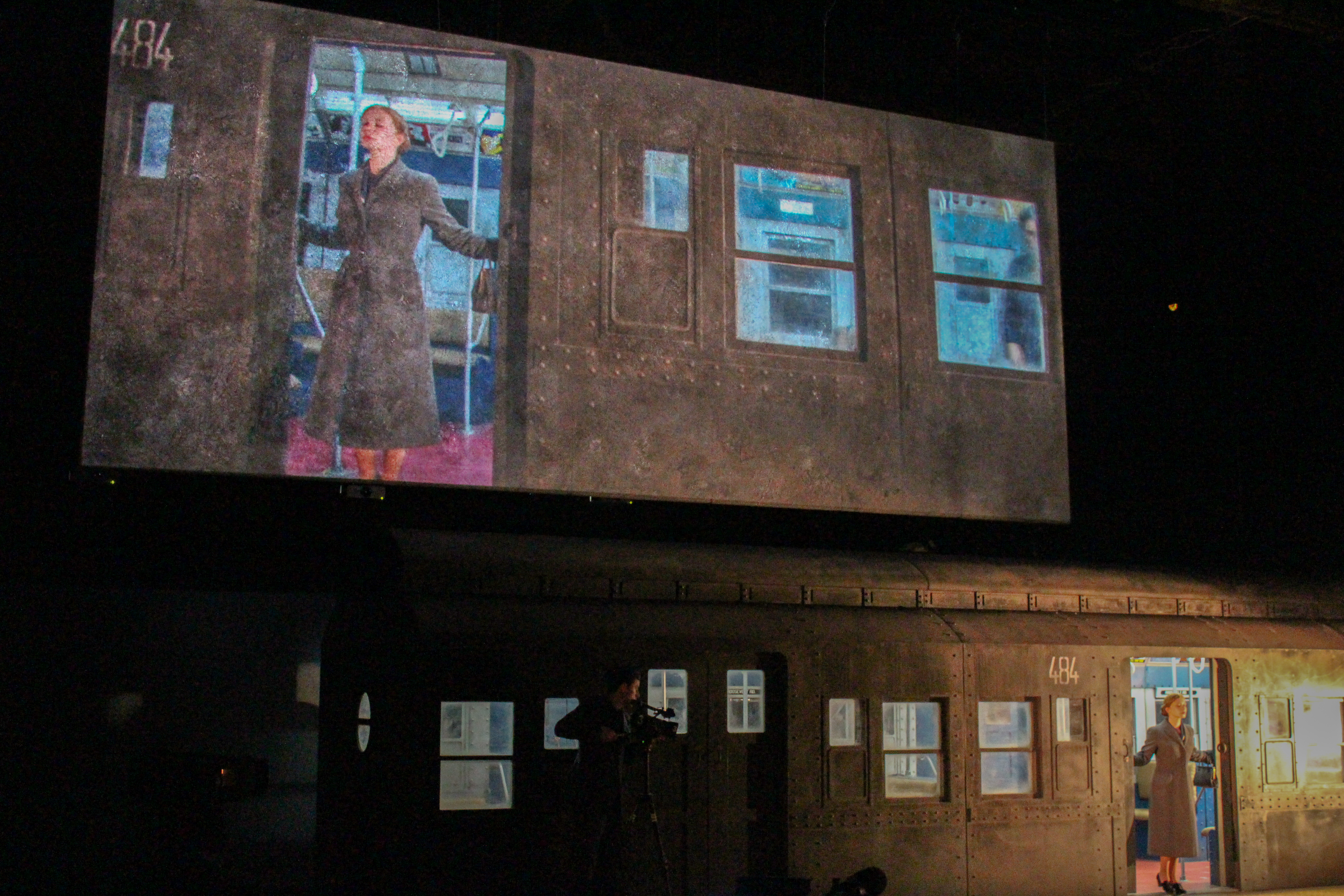 Andreas Hartmann, Jenny König